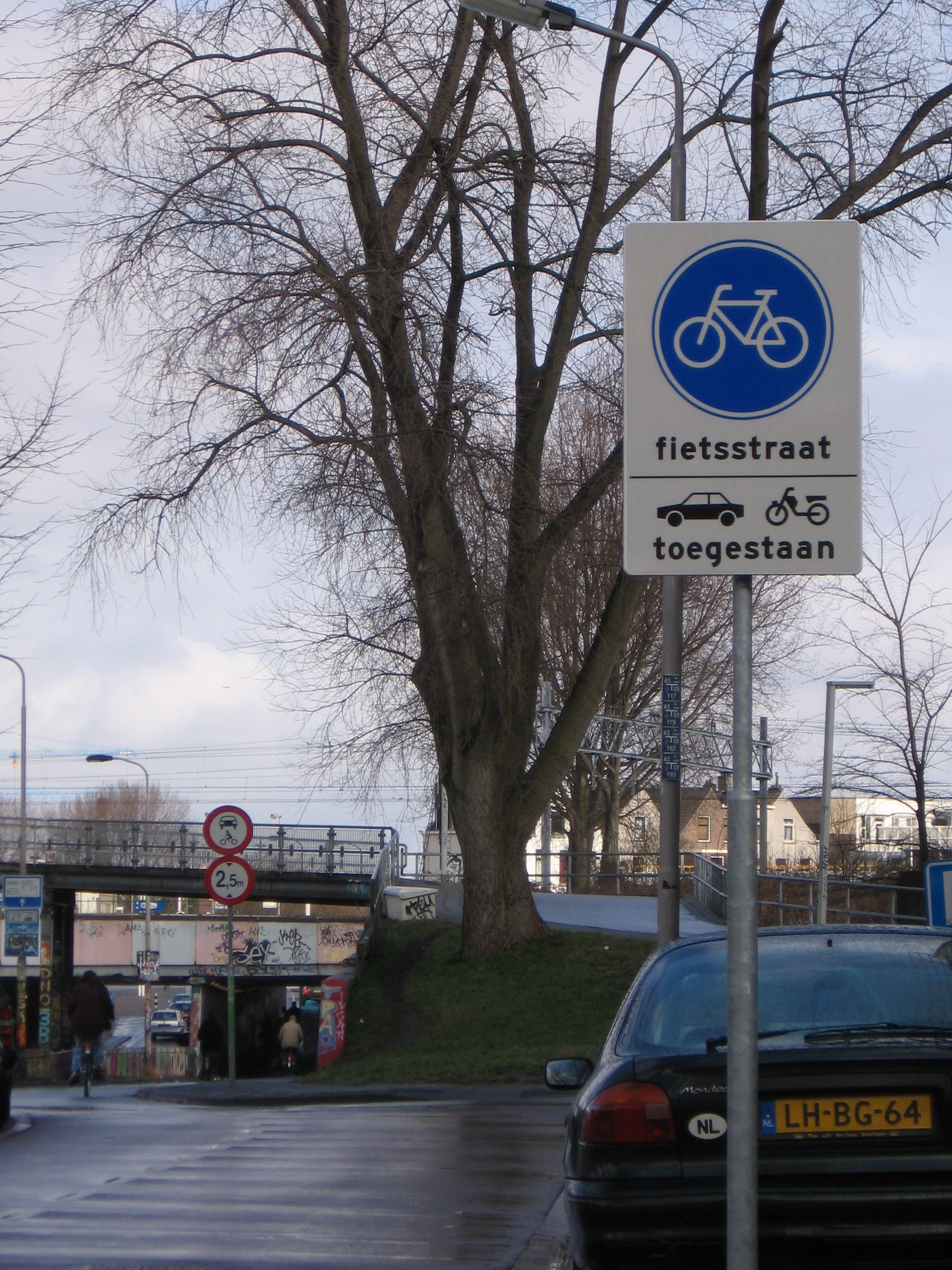 fietsstraat (bord), Delft